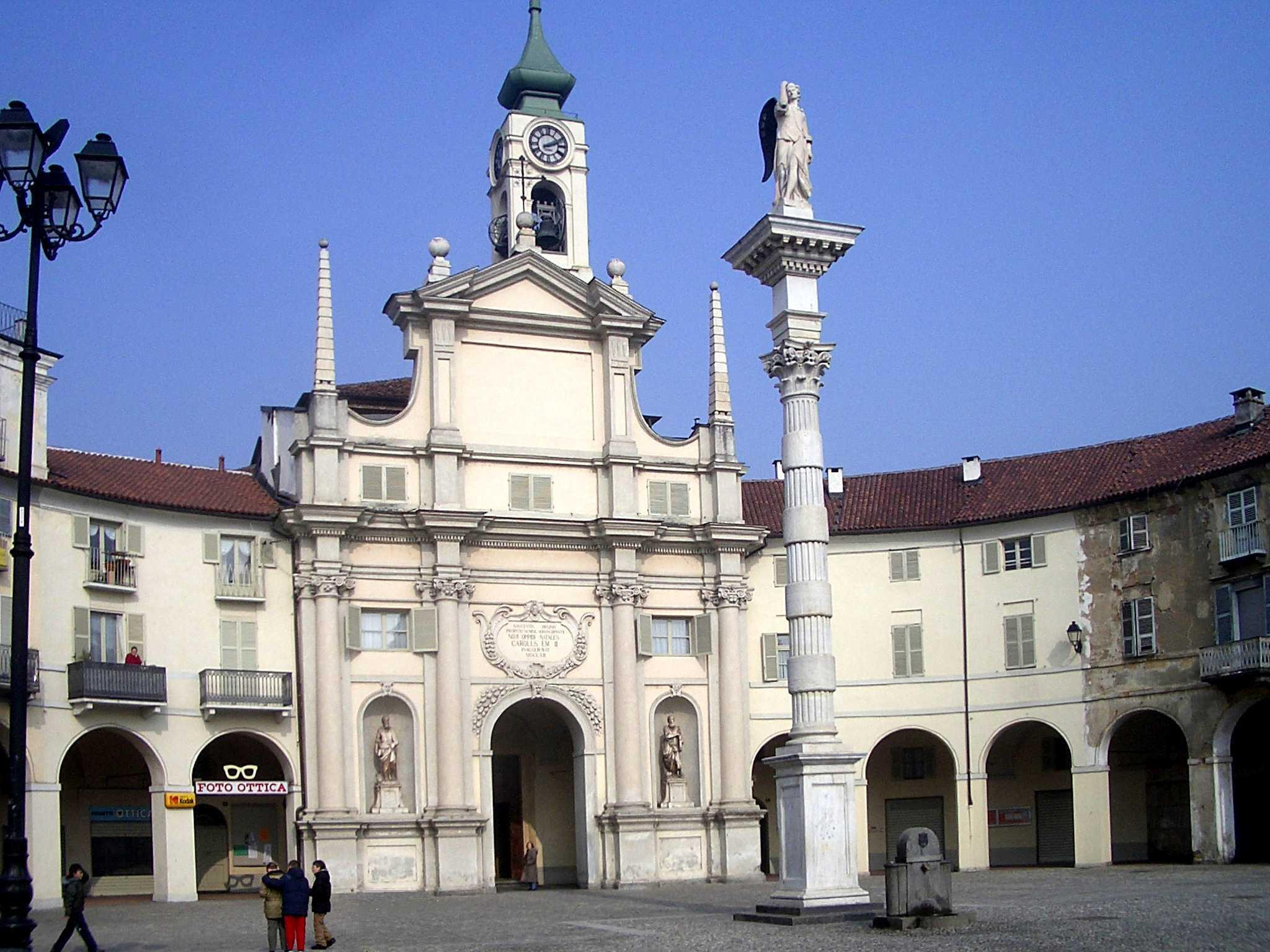 Piazza dell'Annunziata and the parish church, Venaria Reale, Turin, Italy